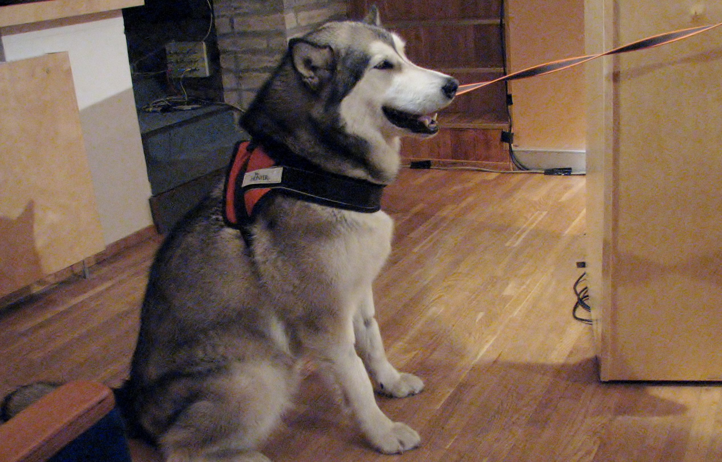 Raamatukoer Susi kirjandusfoorumil "Kas laps loeb?"